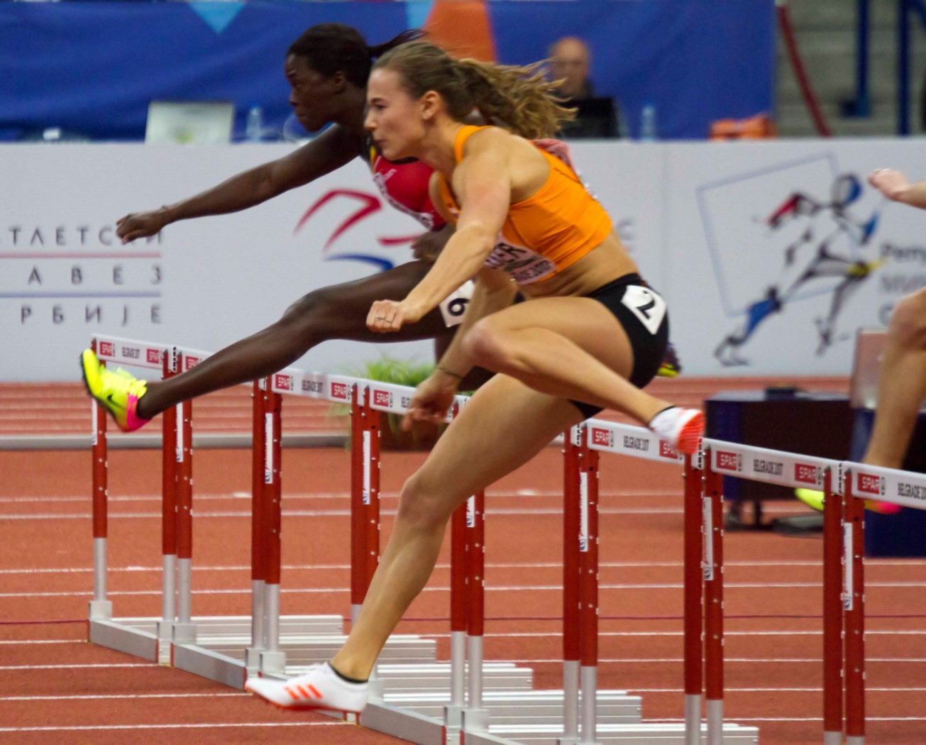 _177 60mH series zagre visser